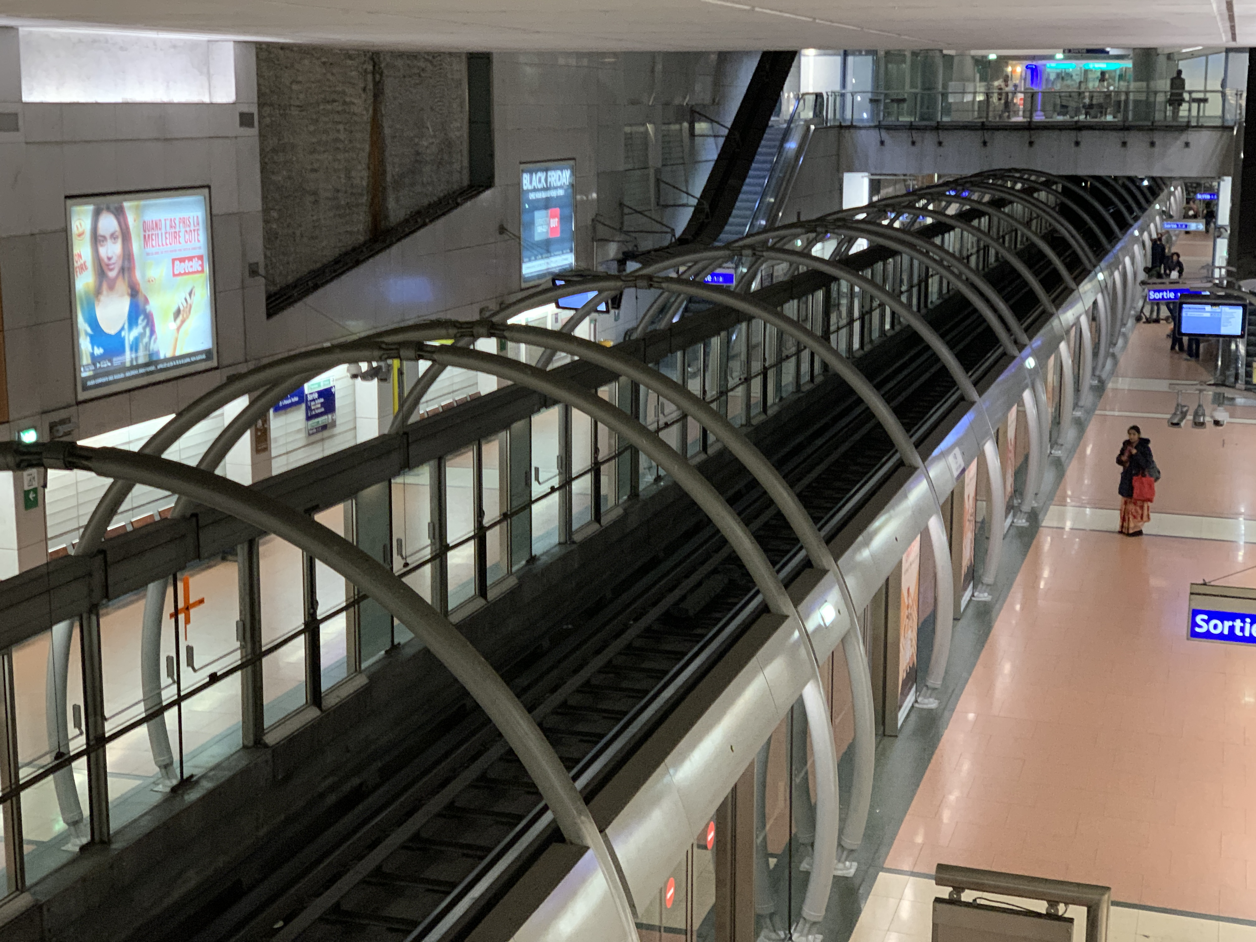 Station de métro Cour Saint-Émilion, Paris.